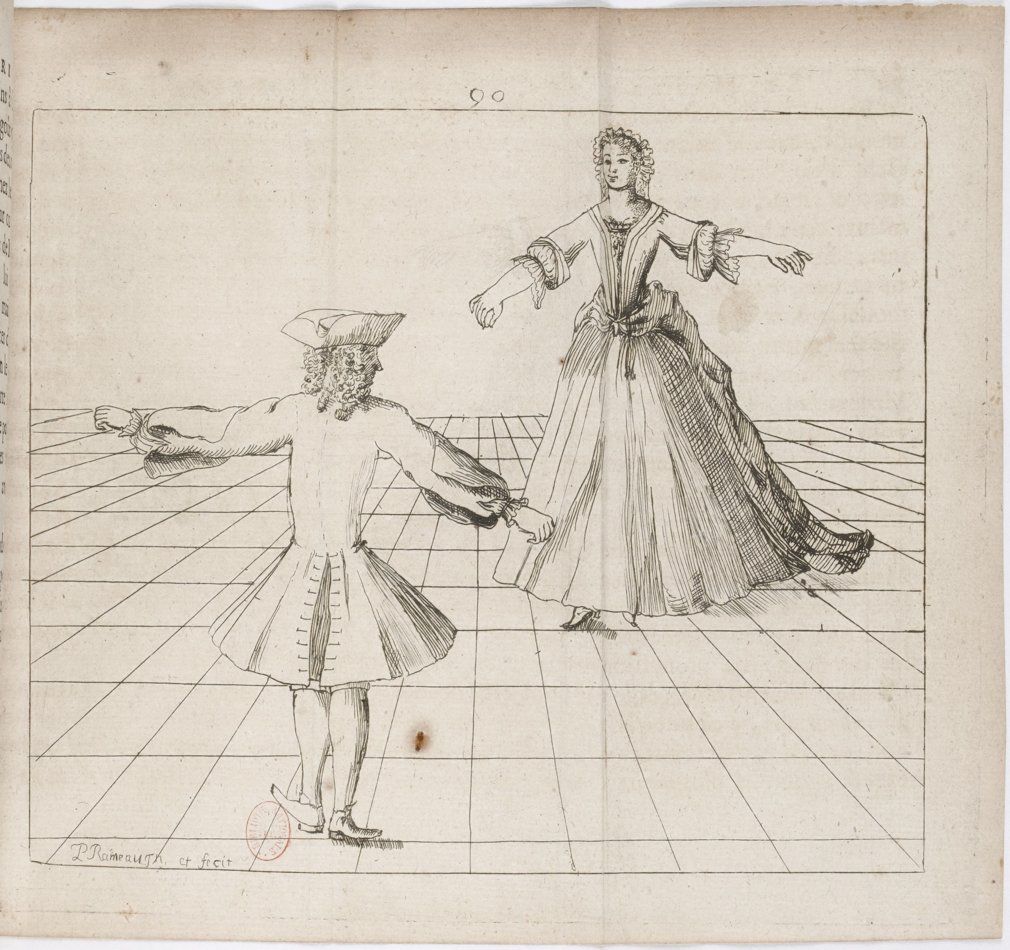 Pierre Rameau, Le Maître à danser, Paris, 1725. Figure du menuet.